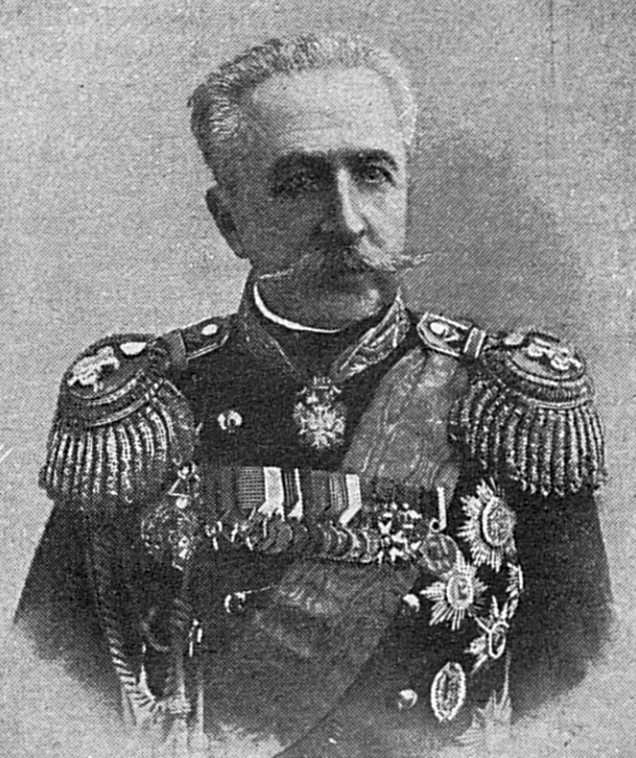 Дми́трий Серге́евич Арсе́ньев (1832—1915) — русский адмирал (1901), Генерал-адъютант (1896), участник Среднеазиатских походов. Внук курляндского губернатора Н. И. Арсеньева.